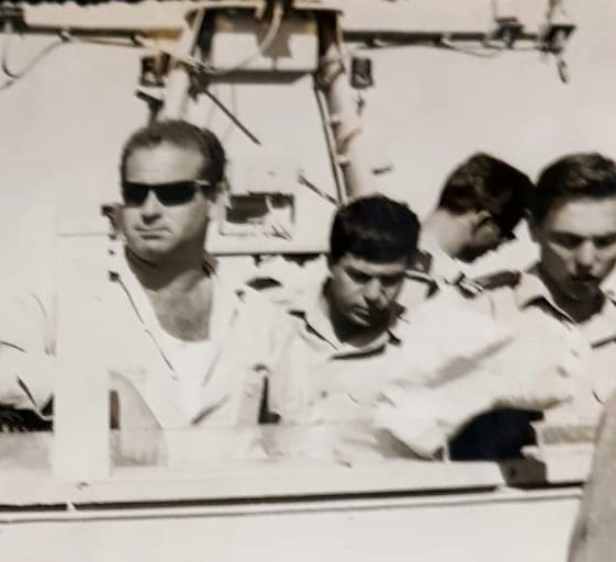 אריה רונה מימין ויורם נחשול משמאל בגשר טרפדת באילת, 1965